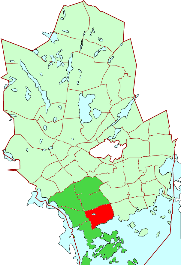 Kaitaa/Kaitans district in Espoo city, Finland